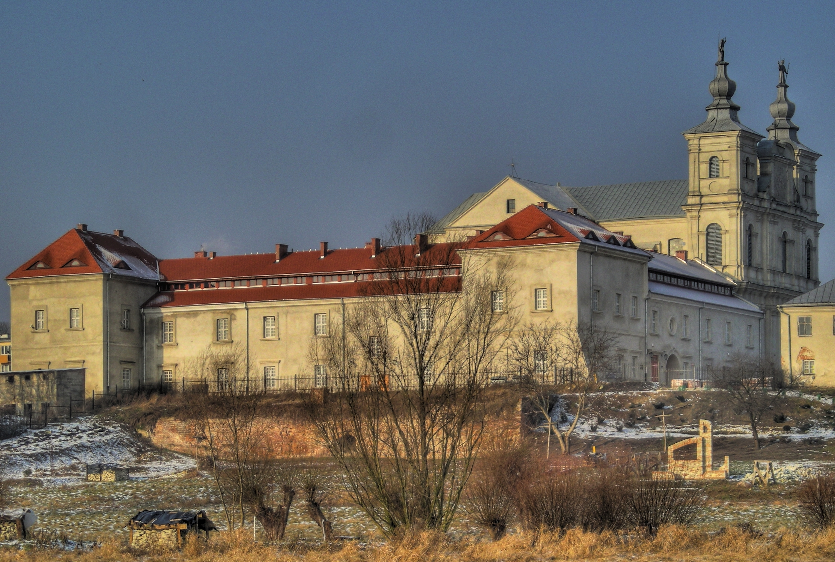 Kolegium pojezuickie przy kościele św. Franciszka Ksawerego w Krasnymstawie widziane od strony południowo wschodniej